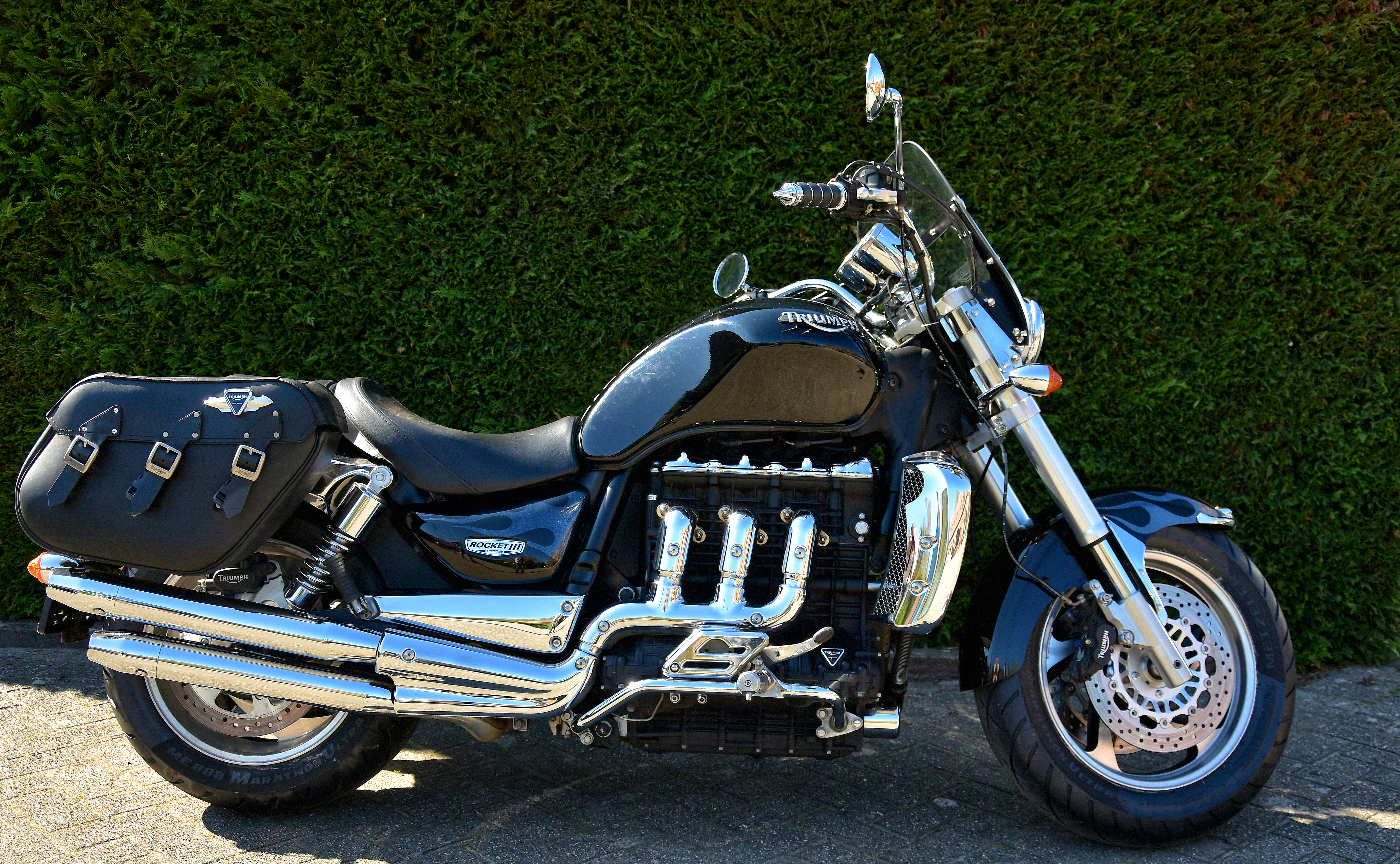 Triumph Rocket III 12-04-2020 14-58-37